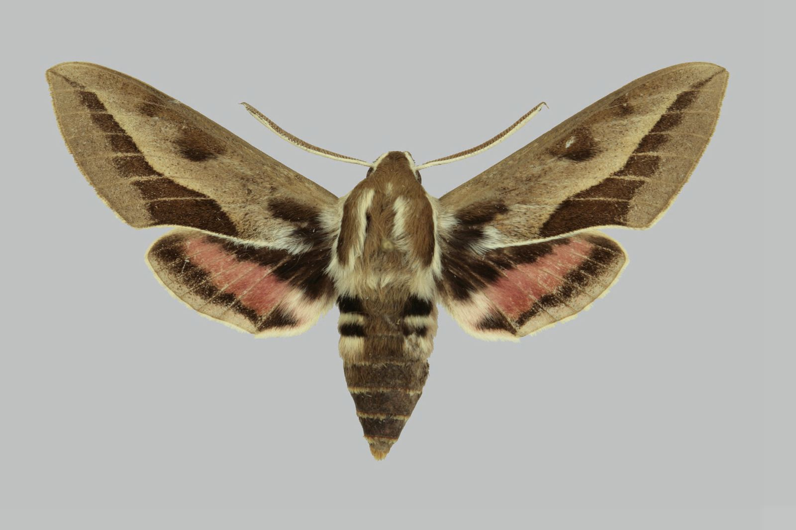 Hyles stroehlei, male, upperside. Pakistan, Hindukush Mts., 5km E Shandur-pass